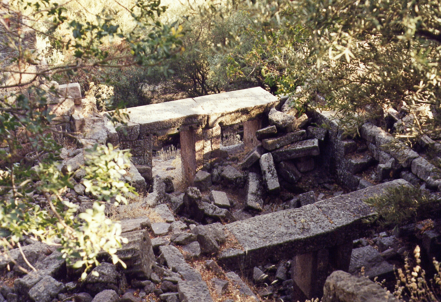 Aigai (Äolis), antike Stadt in der Westtürkei